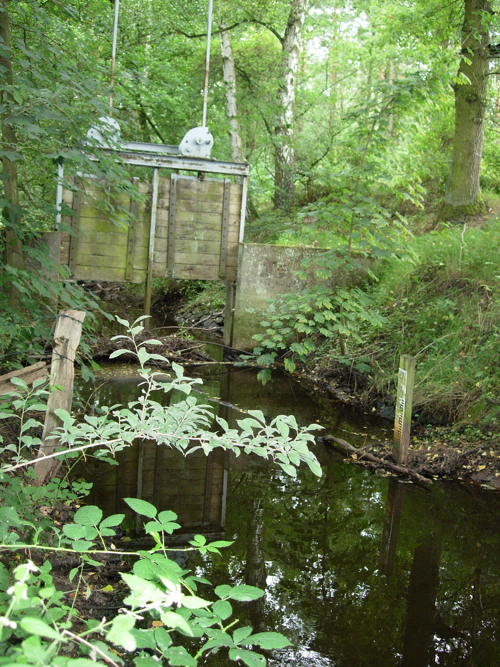 Wedeler Au: Handsiel und Pegel am Rand des Forstes Klövensteen